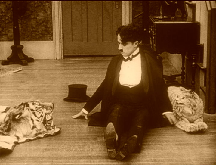 fotografía de la película One A.M. de 1916